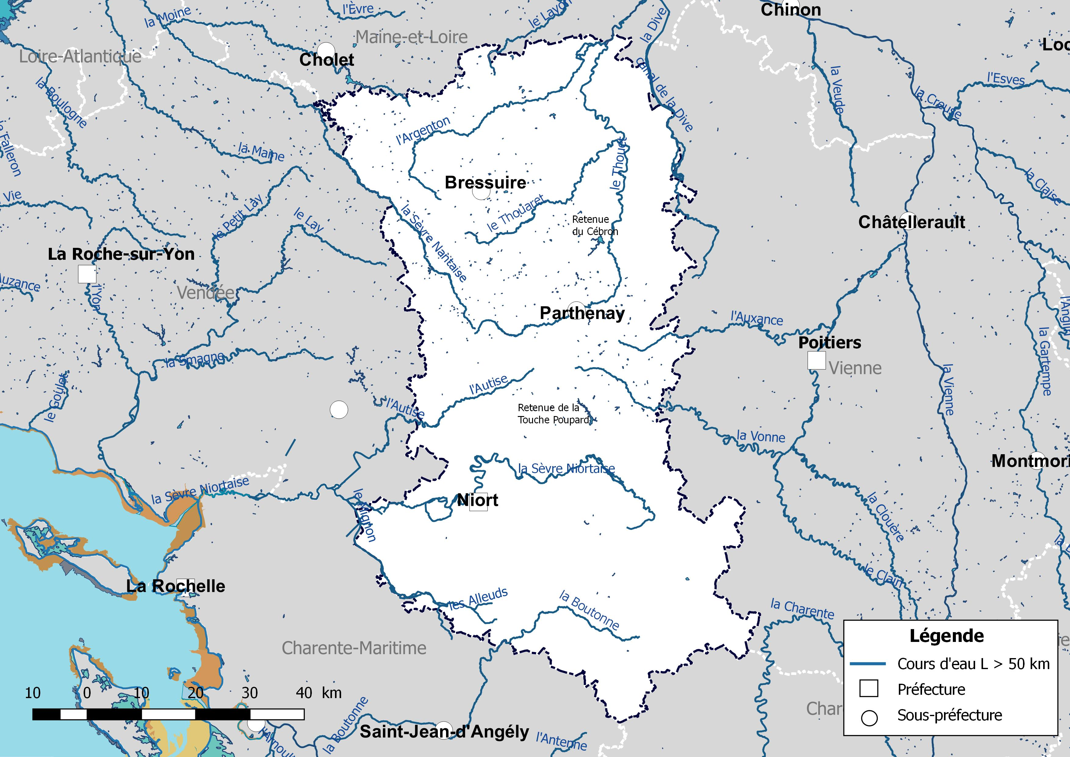 Carte des cours d'eau de longueur supérieure à 50 km drainant le département des Deux-Sèvres (France).